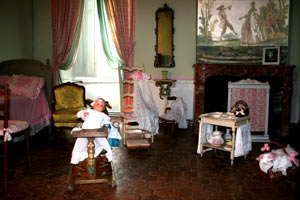 Chambre du Château de Condé dite du musicien, dont la peinture murale au-dessus de la cheminée est attribuée à Watteau